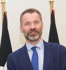 Vegard Kaale, norwegischer Botschafter in Indonesioen und Osttimor